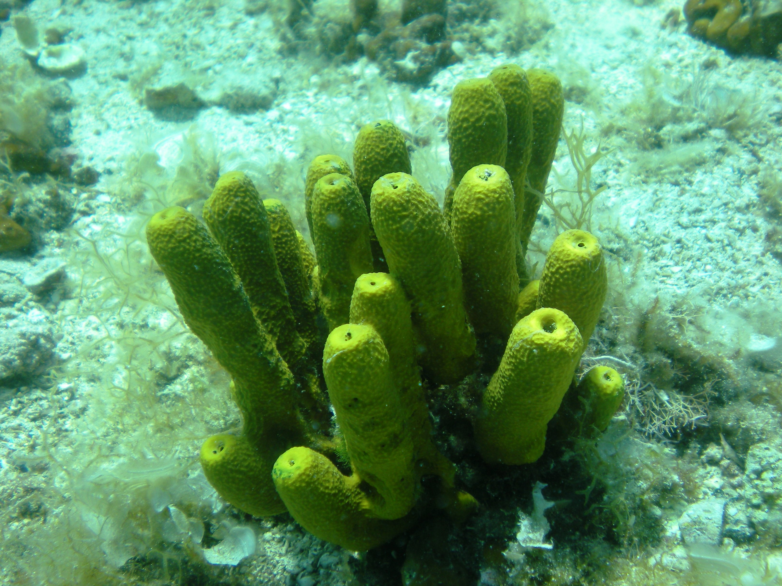 Aplysina aerophobamar Adriatico, isola di Brac (Croatia)